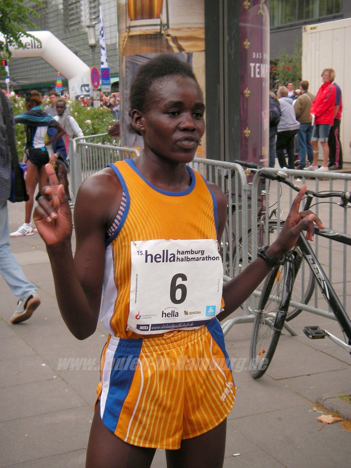 Caroline Chepkwony, KEN, Siegerin 15. hella Halbmarathon Hamburg 2009